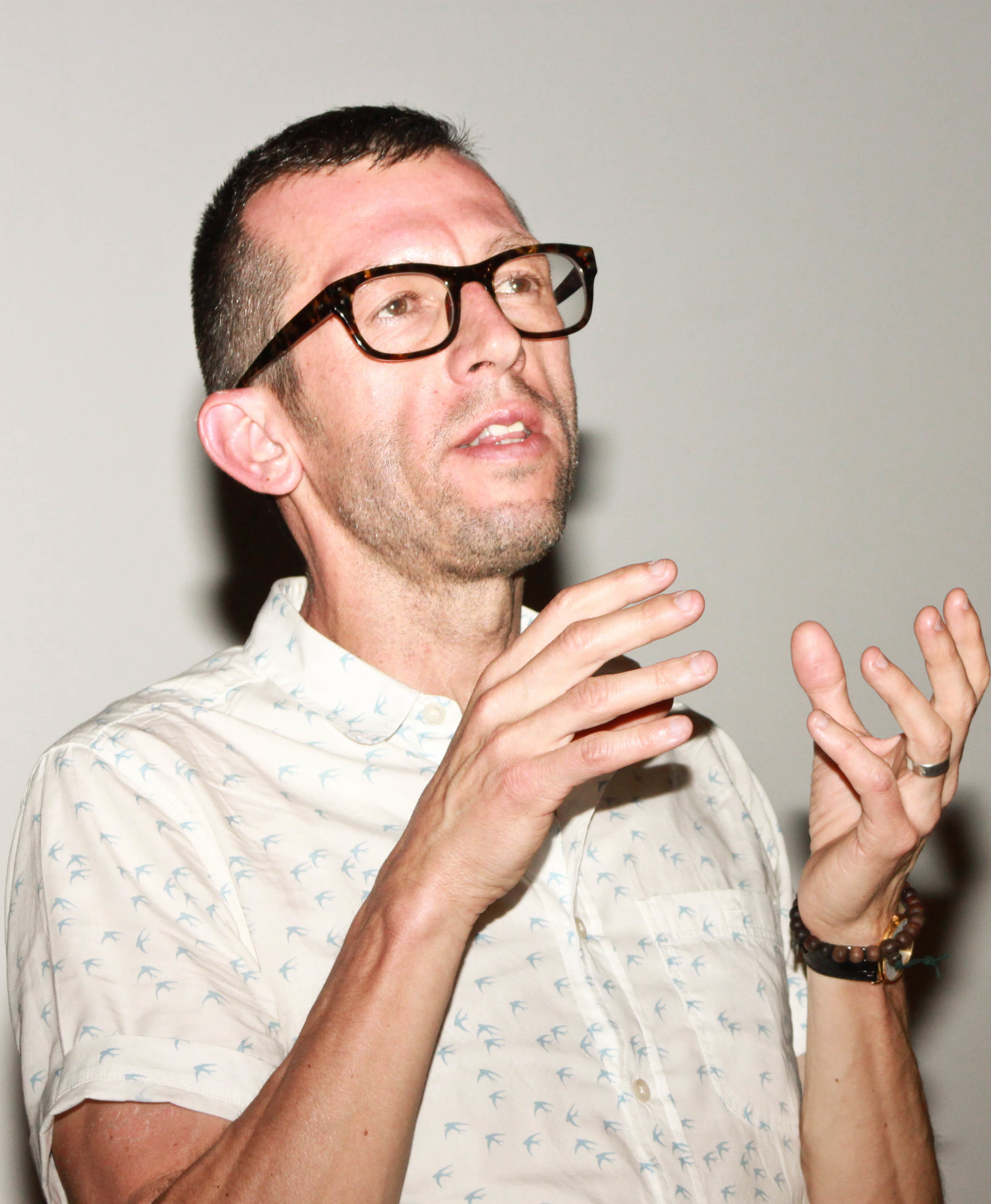 Centro de Cultura Digital Estela de Luz. 19 de febrero. Foto por Delia Martínez.